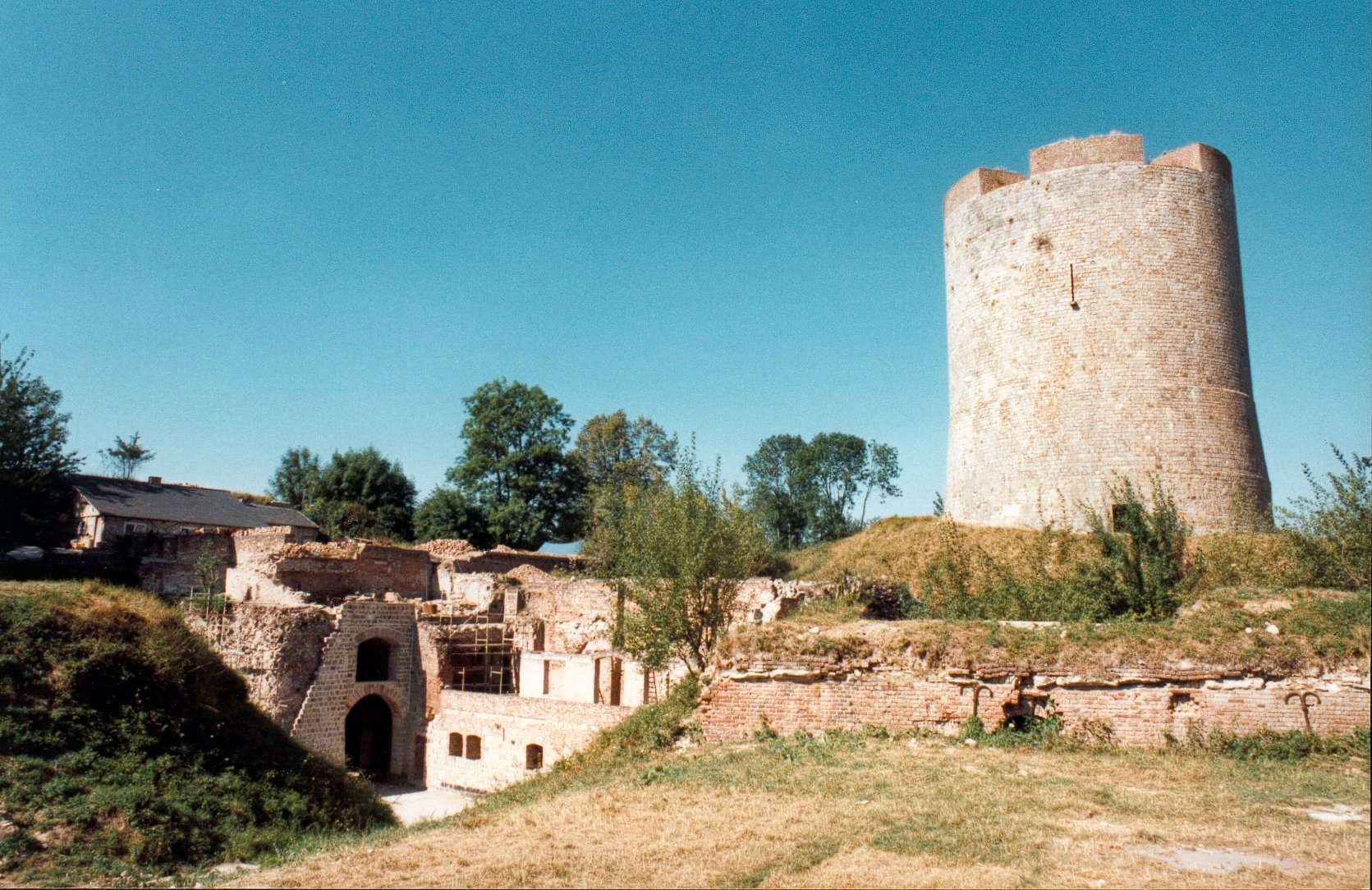 Vue du donjon depuis la basse cour du Château